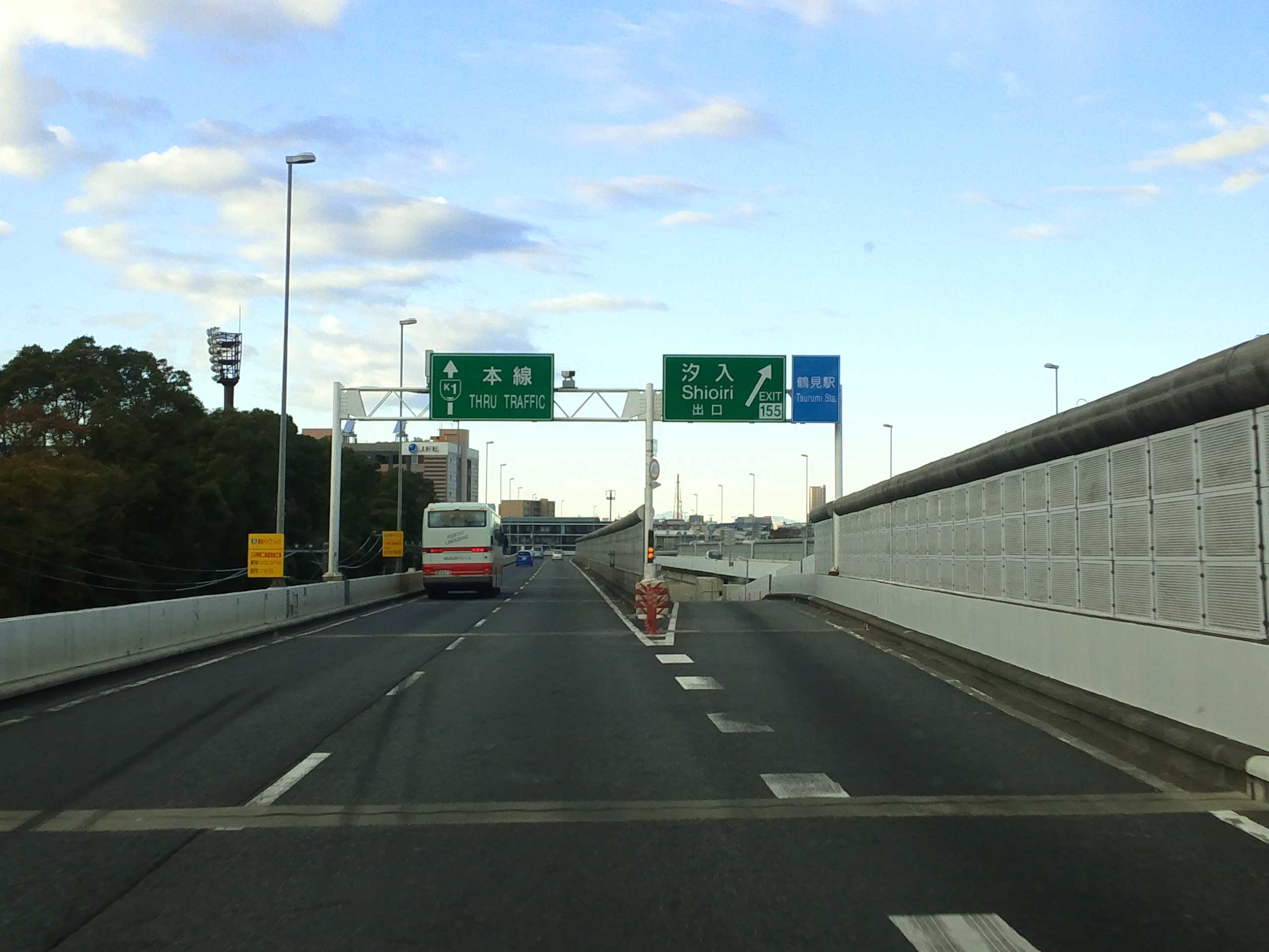 首都高速道路神奈川1号横羽線汐入出口付近（金港JCT方面側出口）